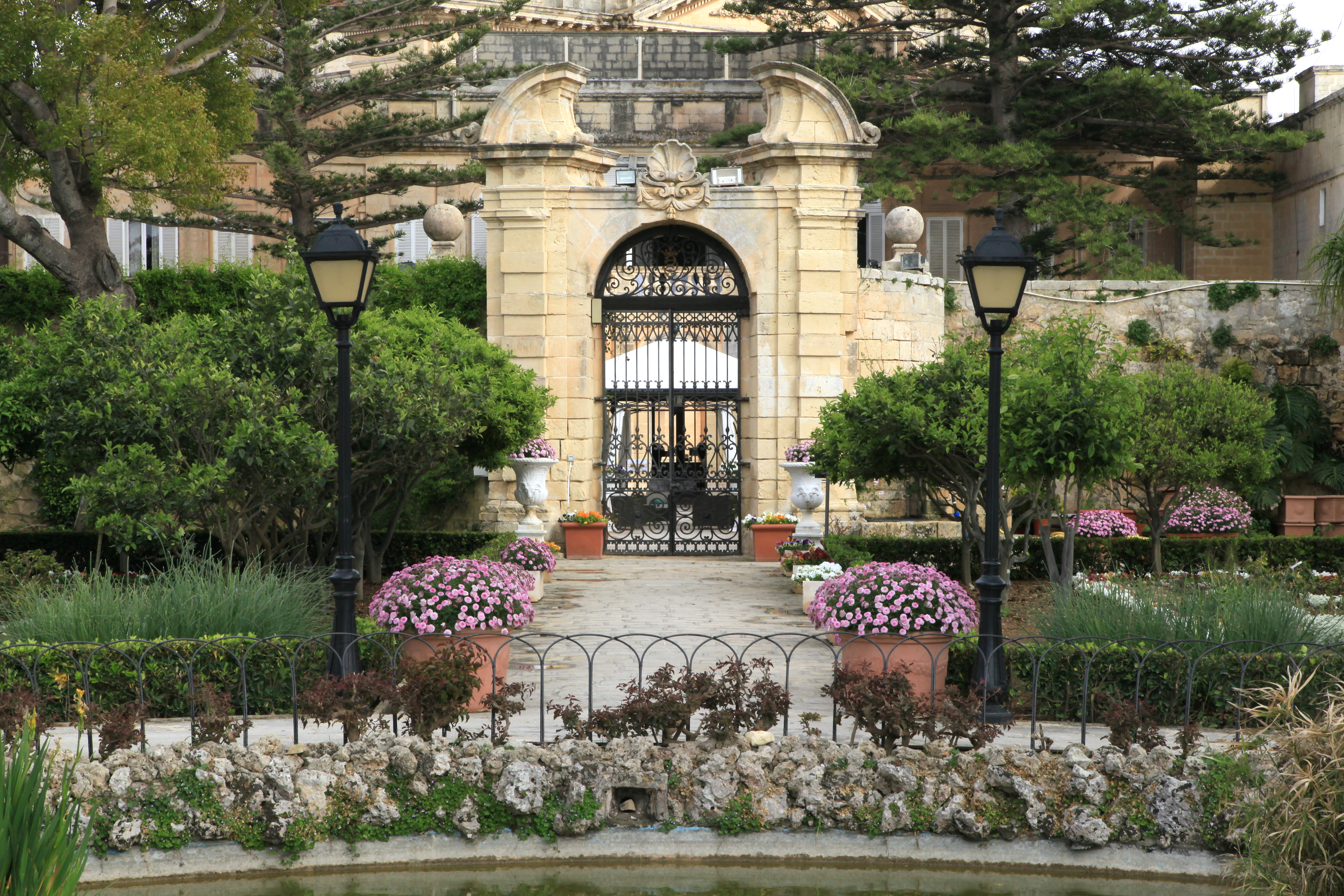 Palazzo Parisio Gardens, Triq il-Markiż Scicluna in Naxxar, Malta